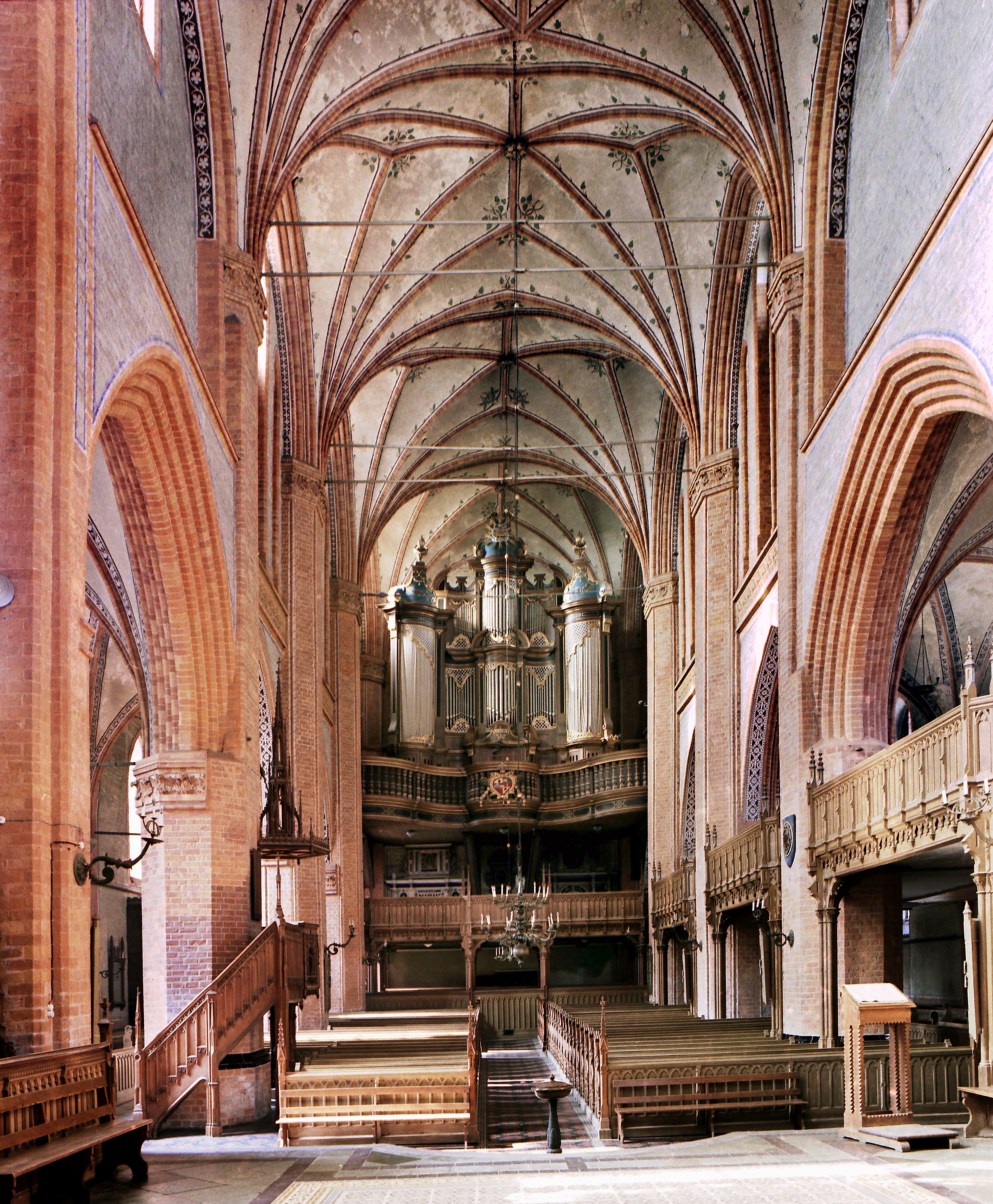 22.09.1987 DDR 2040 [17139] Malchin, Schweriner Straße 5: St. Johanniskirche (GMP: 53.739092,12.761740). Spätgotische Backstein-Basilika, erbaut nach dem Brand von 1397 mit Benutzung älterer Teile, 1440 geweiht. Orgelprospekt 1780 von Paul Schmidt, darin die Orgel von 1878 von Friedrich Friese III. [R19870922A03.JPG]19870922140NR.JPG(c)Blobelt